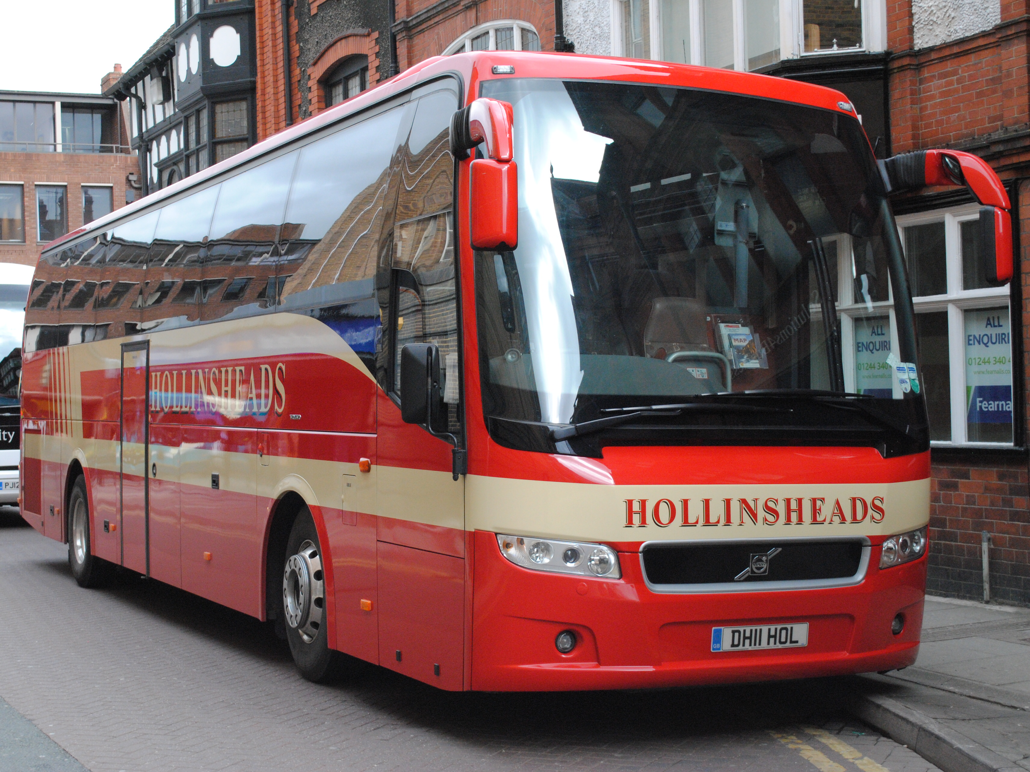 Volvo B13R Prestige 9700